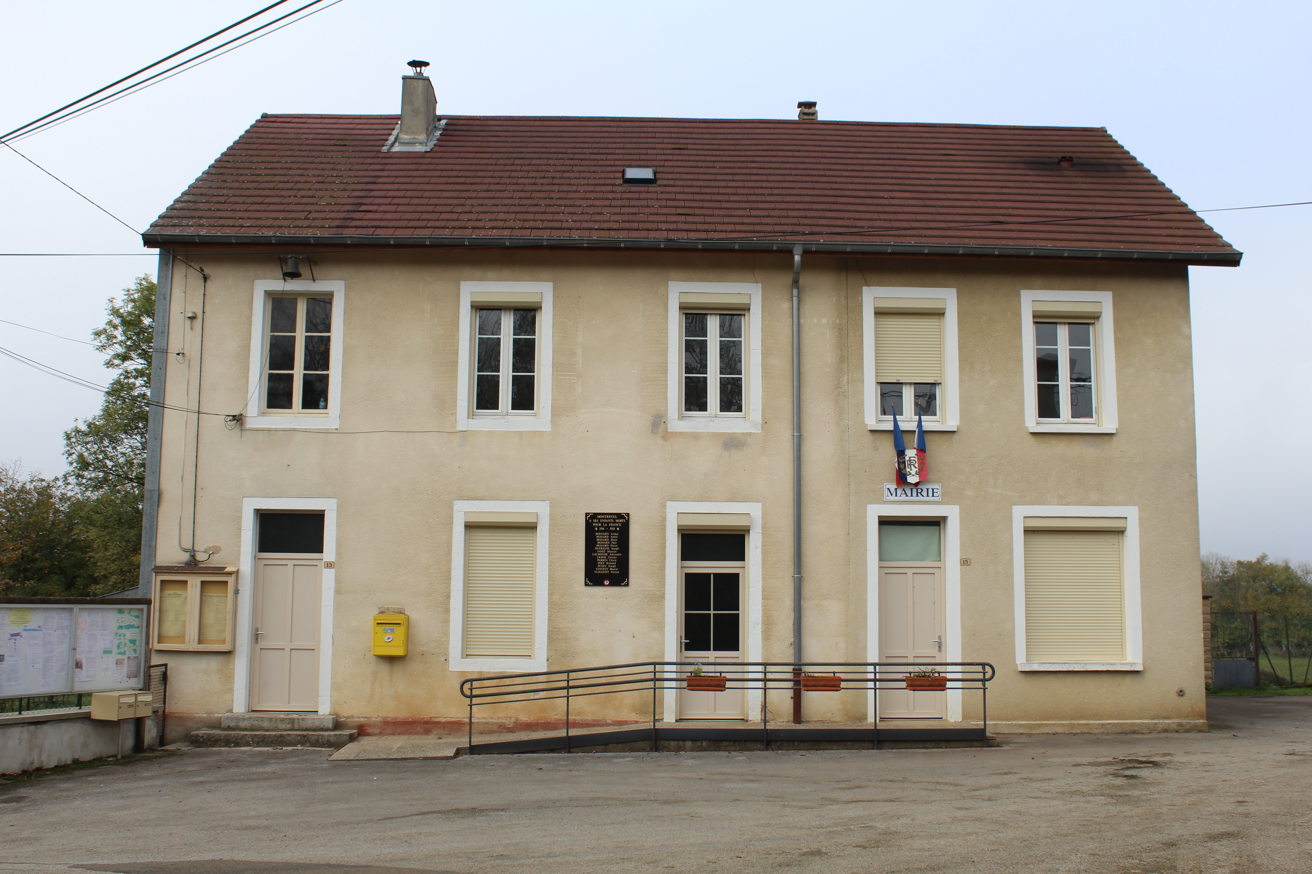 Mairie de Montrevel, Jura.